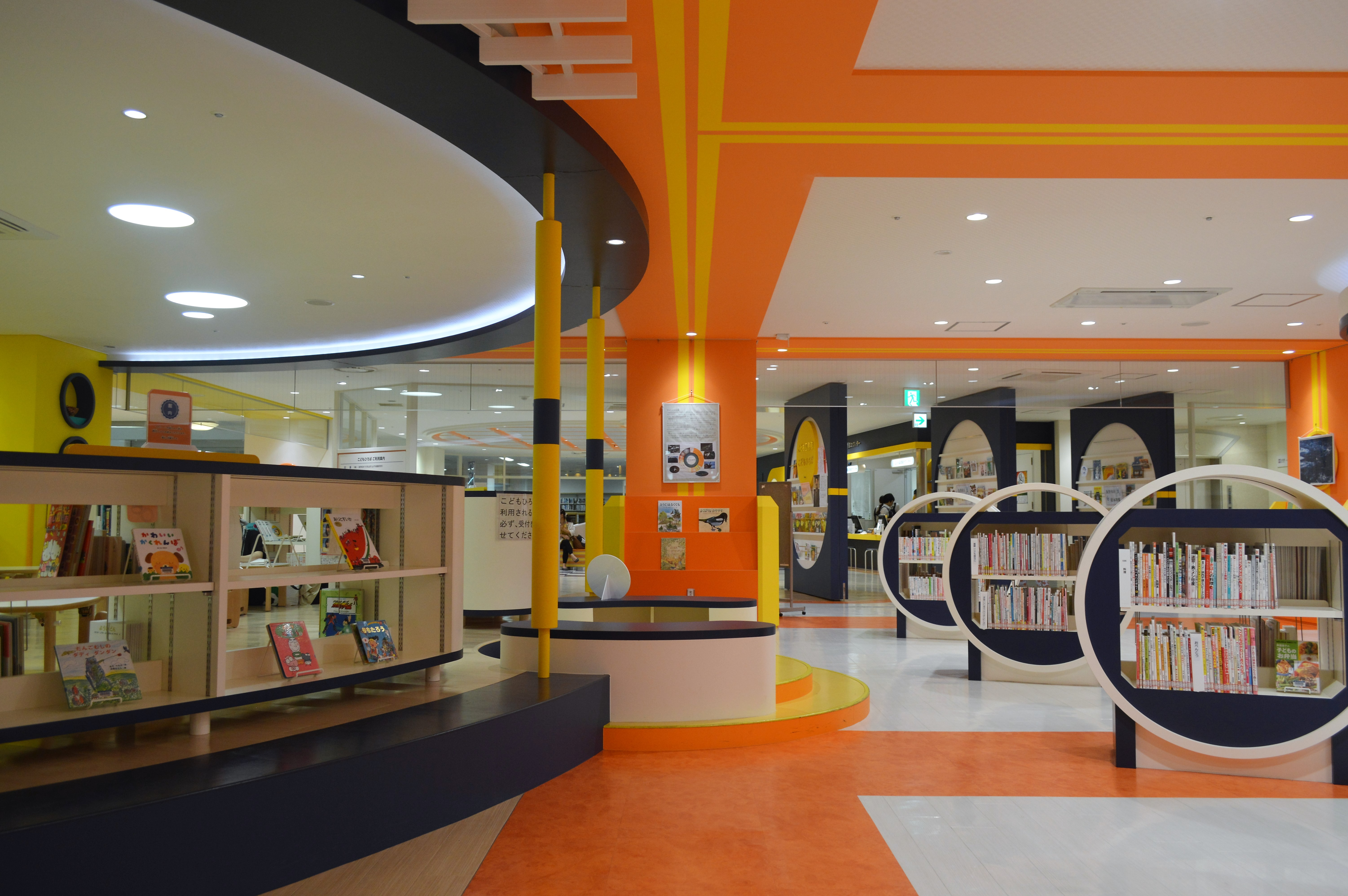 富山市立こども図書館。富山駅前のCiCビル4階。富山市立とやま駅南図書館（ぶらり）に併設されている。